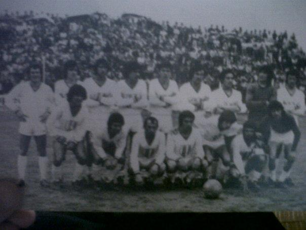 El equipo campeón del Club General Belgrano de la Liga Cultural 1978